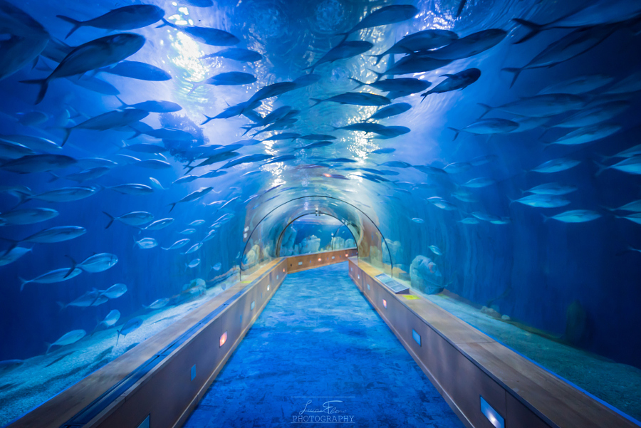 Аквариум, Океанографический парк Валенсии